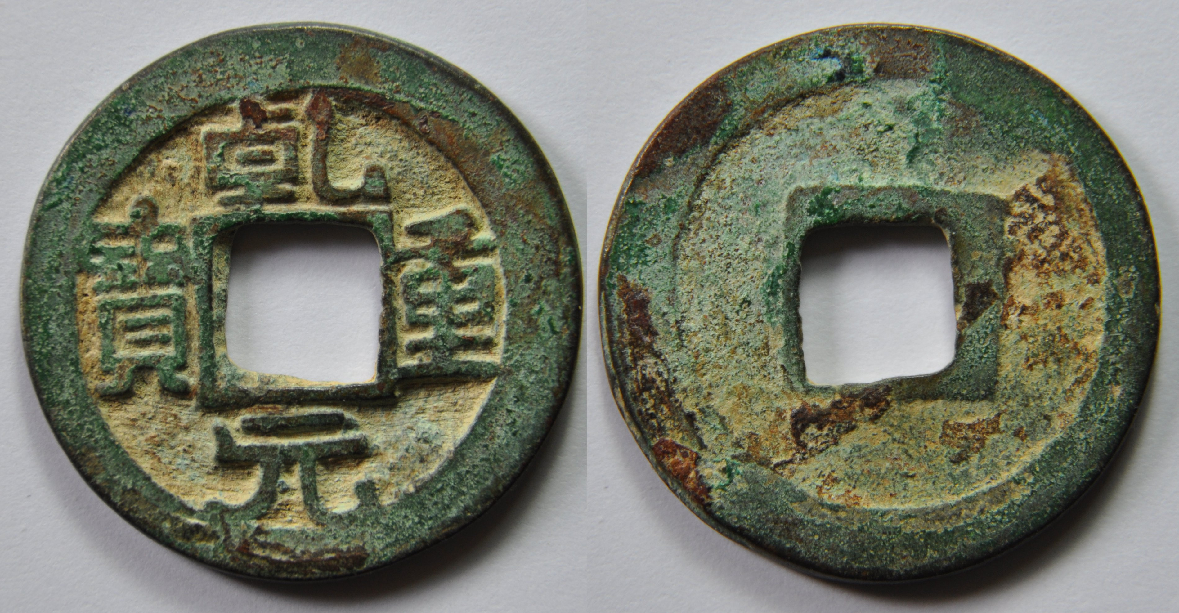 Une monnaie en bronze de 10 sapèques de l'empereur Su Zong (756-762) de la dynastie Tang (618-907), ère Qian Yuan. A/ Qian Yuan zhong bao (Monnaie lourde de Qian Yuan) R/ vide Dimension : 23,55 mm Poids : 3,2 g. Remarque : Les monnaies Qian Yuan zhong bao ont été fondues à partir de 758-759 (1ère année de l'ère Qian Yuan) pour une valeur de 10 sapèques (10 cash). Elles faisaient environ 30 mm pour 8 g. Mais très vite, il y a quantité de contrefaçons ne respectant pas la taille ni le poids. C'était évidemment puni de mort, par bastonnade. Cette monnaie est une contrefaçon de type IV de bonne facture. Elle ne pèse pas plus lourd qu'une monnaie normale. Référence : H14.114 ; Thierry Type IV Indice de rareté : 14 (Commune) d'après D. Hartill